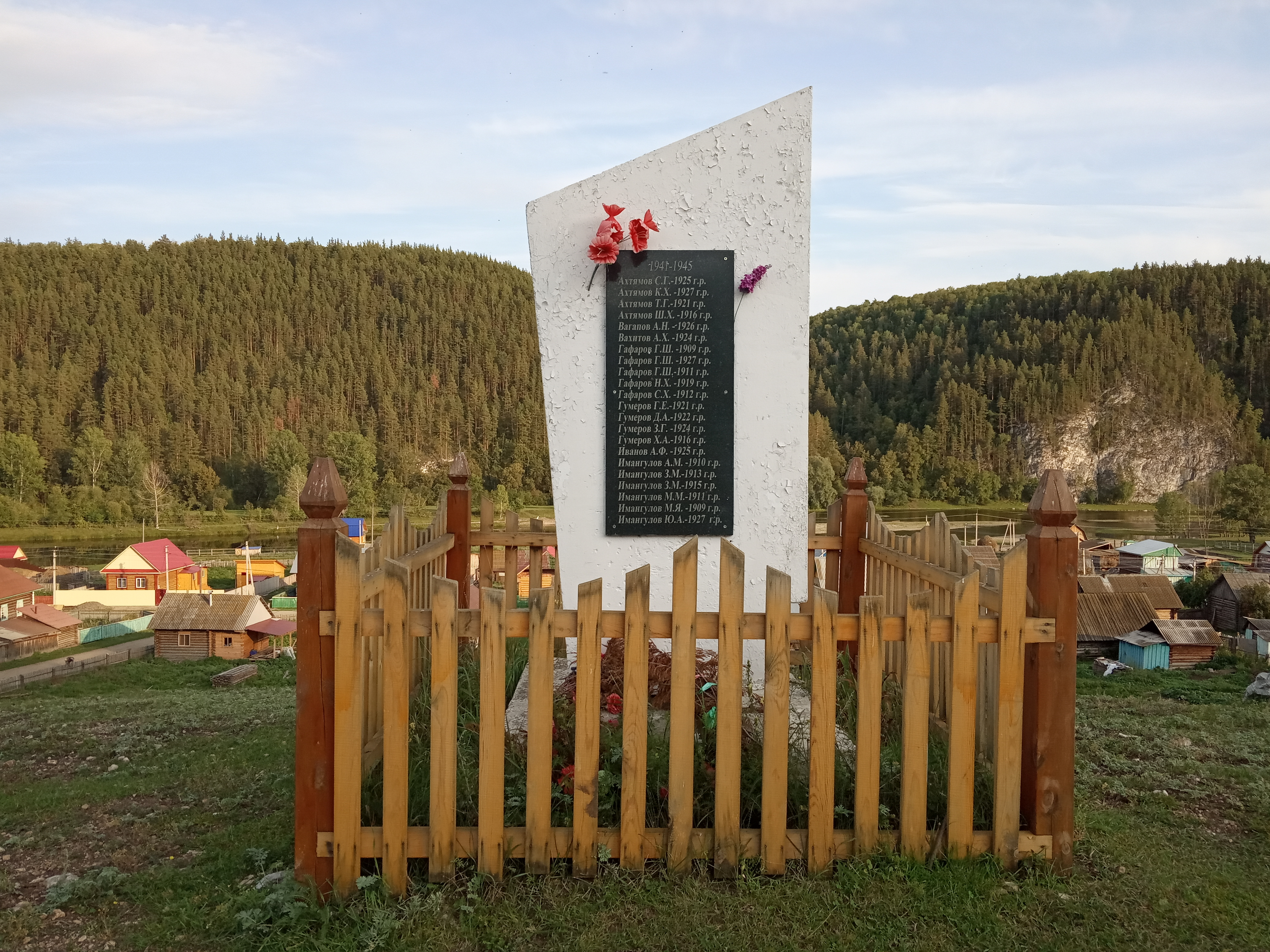 Башҡортса: Бер ауылдан Бөйөк Ватан һуғышында ҡатнашыусылар исемлеге